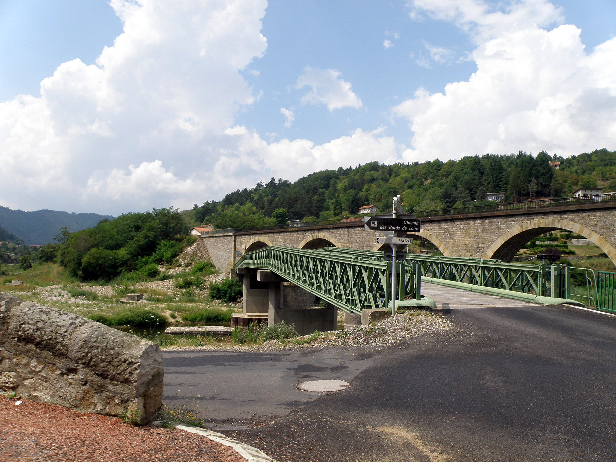 Chamalières-sur-Loire, comm. dans le départ. de la Haute-Loire, France (région Auvergne). Ponts sur la Loire à 300m. au nord-est (c'est-à-dire en aval) de Chamalières : pont routier (métallique, vert pâle) et, au second plan, ferroviaire (de pierre, à arches).